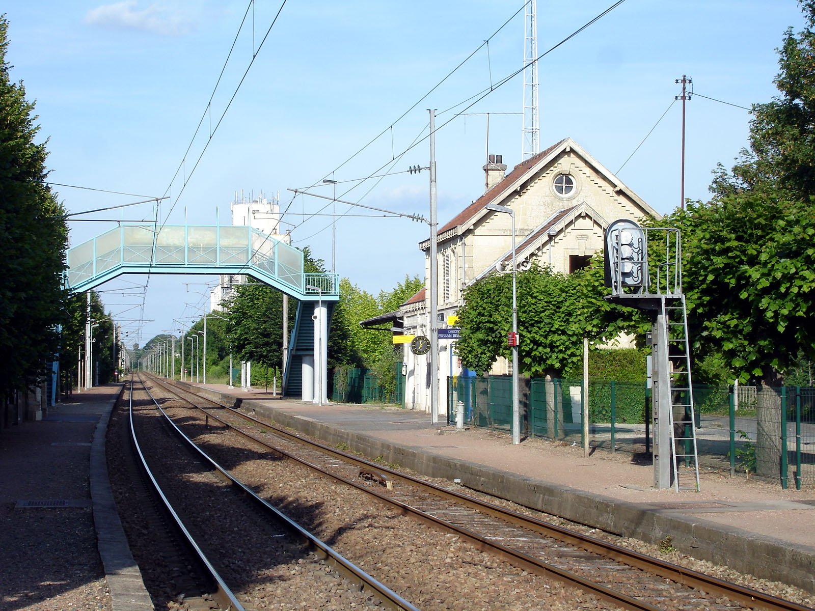 La gare de Précy-sur-Oise, Oise, France.